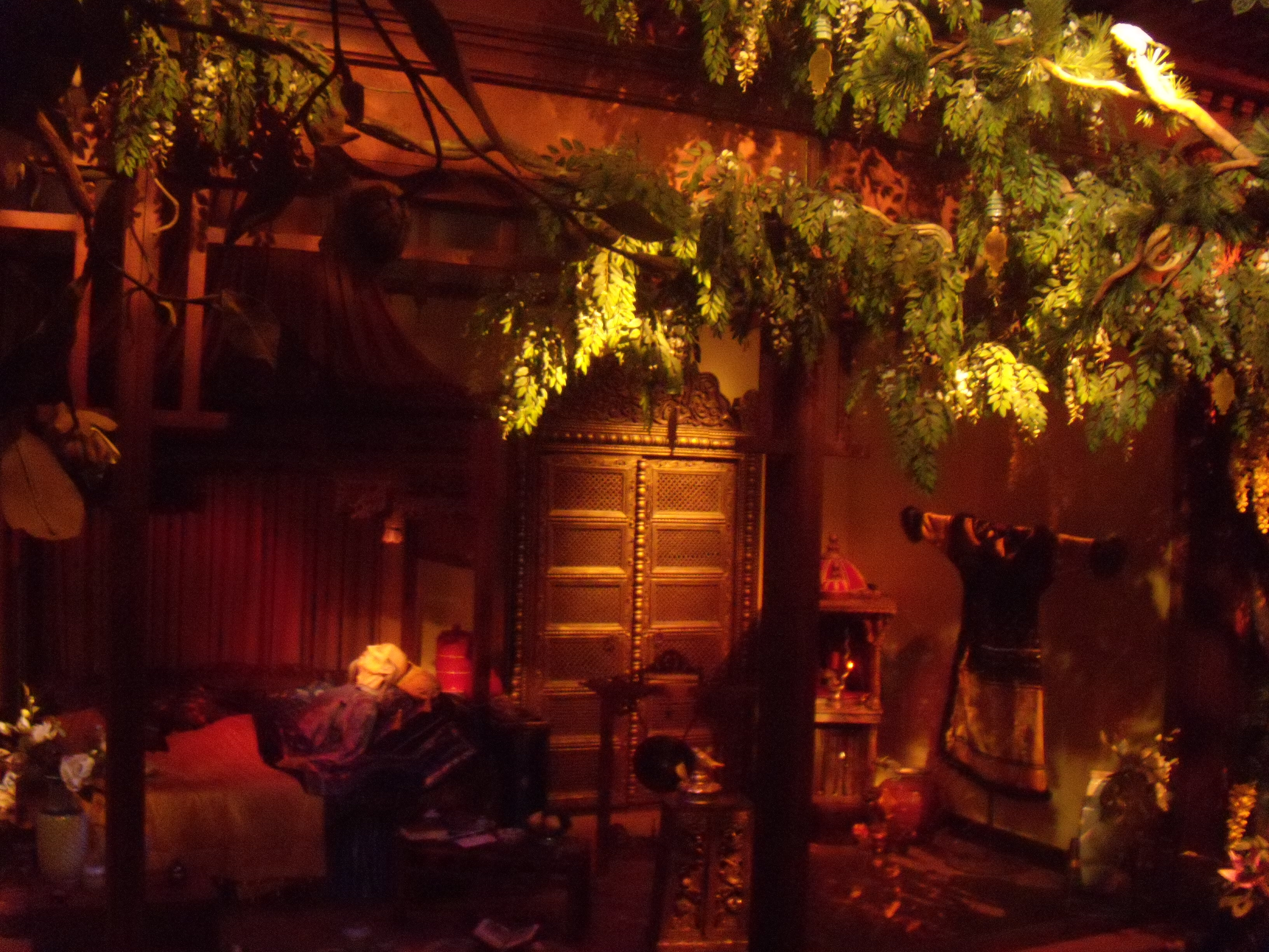 Représentation du conte De Chinese Nachtegaal (Le Rossignol et l'Empereur de Chine) dans le Bois des contes à Efteling.